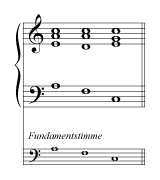 Notenbeispiel für eine VI-IV-I-Kadenz (plagale Wendung)